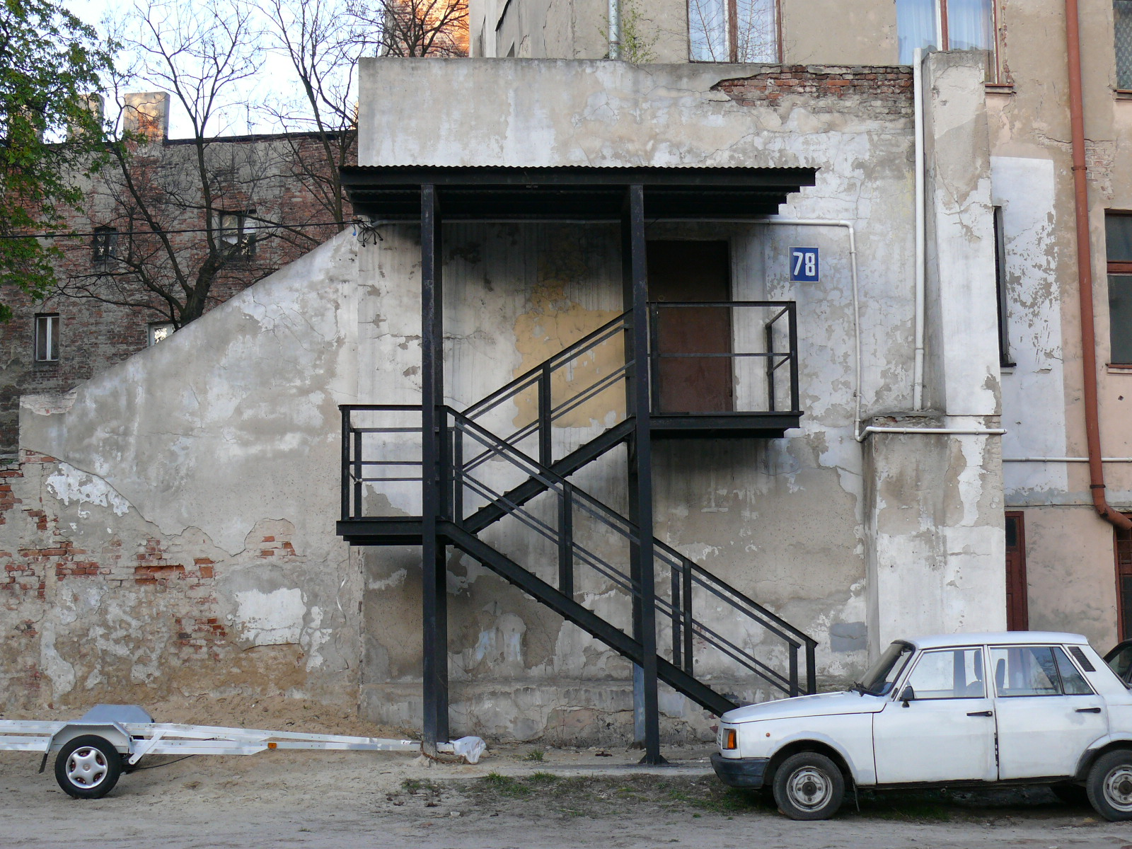 Dawne biuro Zew Wawa Morejno, Łódź